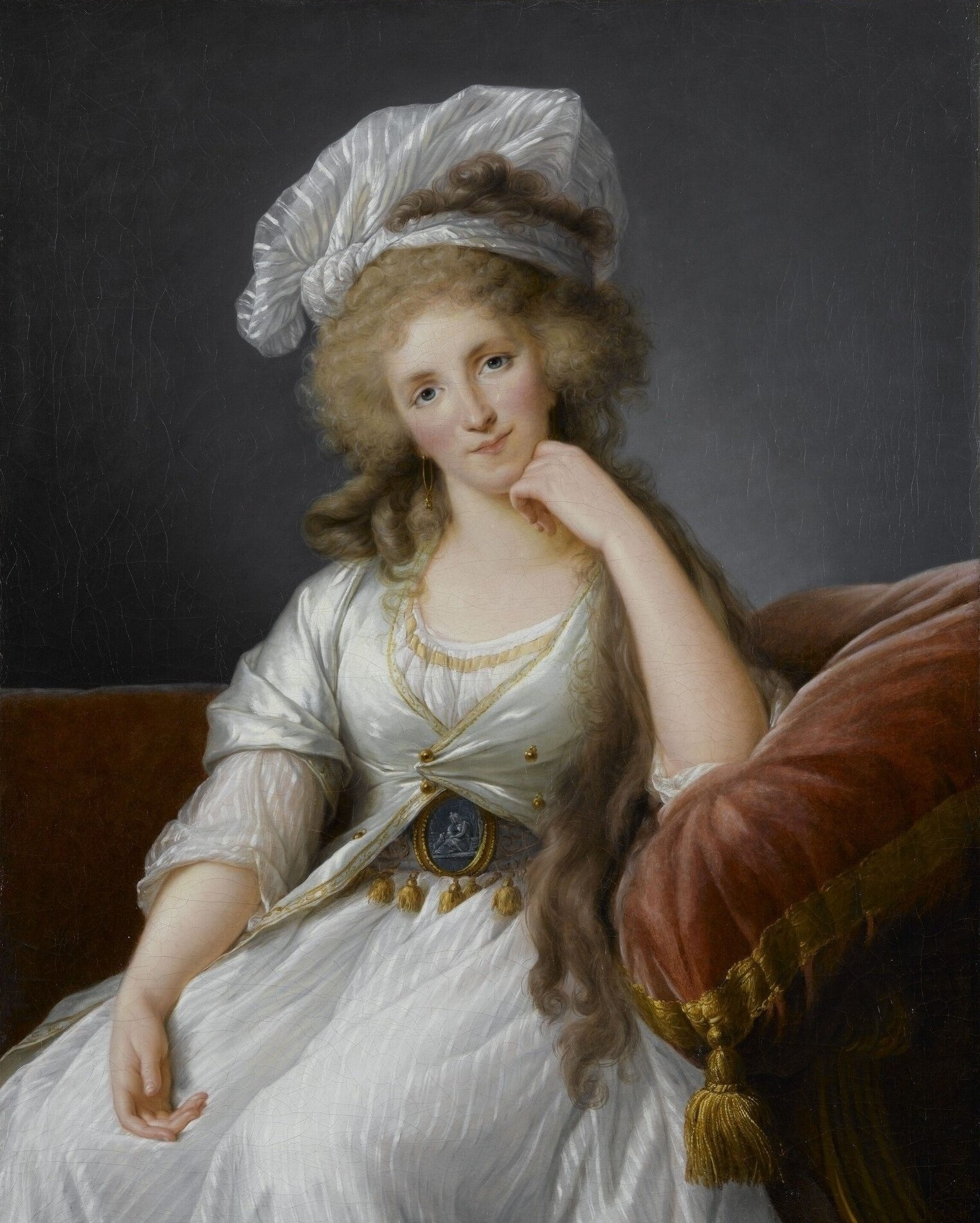 Portrait of Louise Marie Adélaïde de Bourbon (1753-1821)